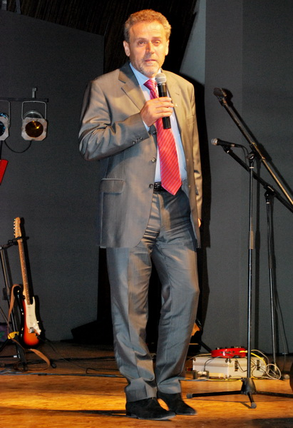 Milan Bandić na Grudskoj večeri u Zagrebu, 2009